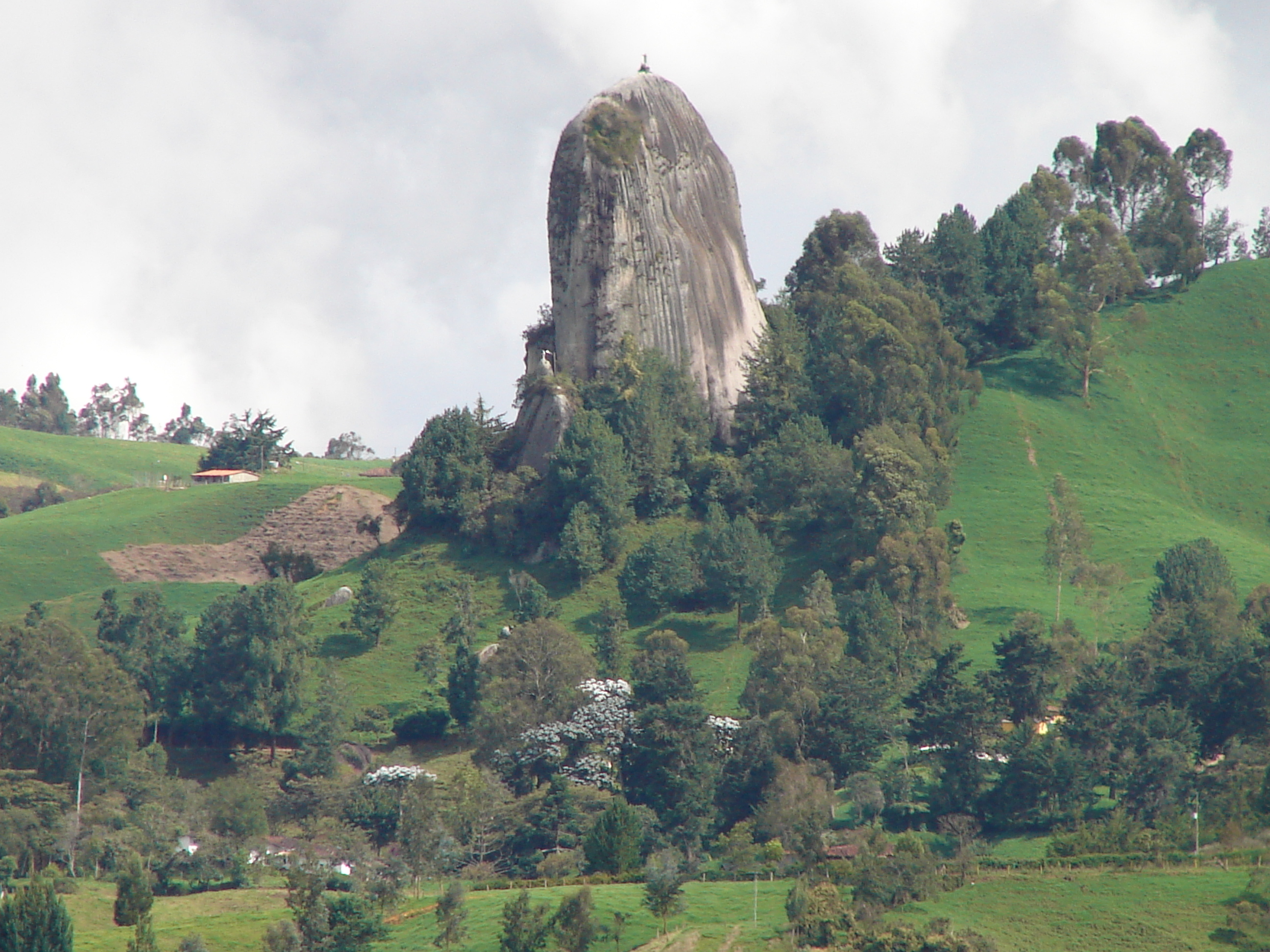 piedra o monolito del municipio de Entrerríos, Colombia.